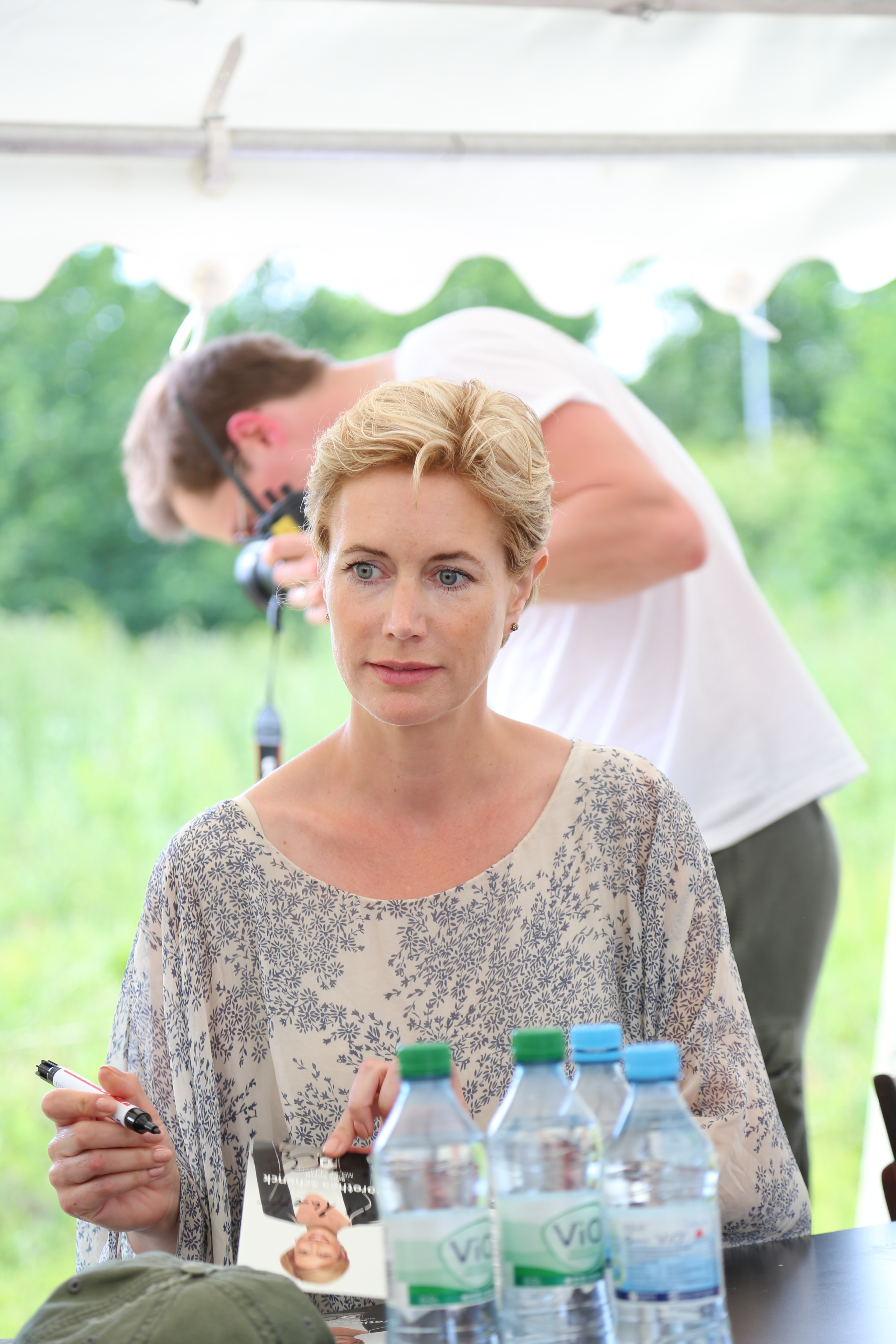 Dorothea Schenck schreibt Autogramme beim "Rote Rosen"-Fantag 2017, am 18.06.2017 in Lüneburg.